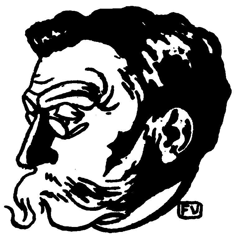 Portrait of Belgian poet Émile Verhaeren (1855–1916)